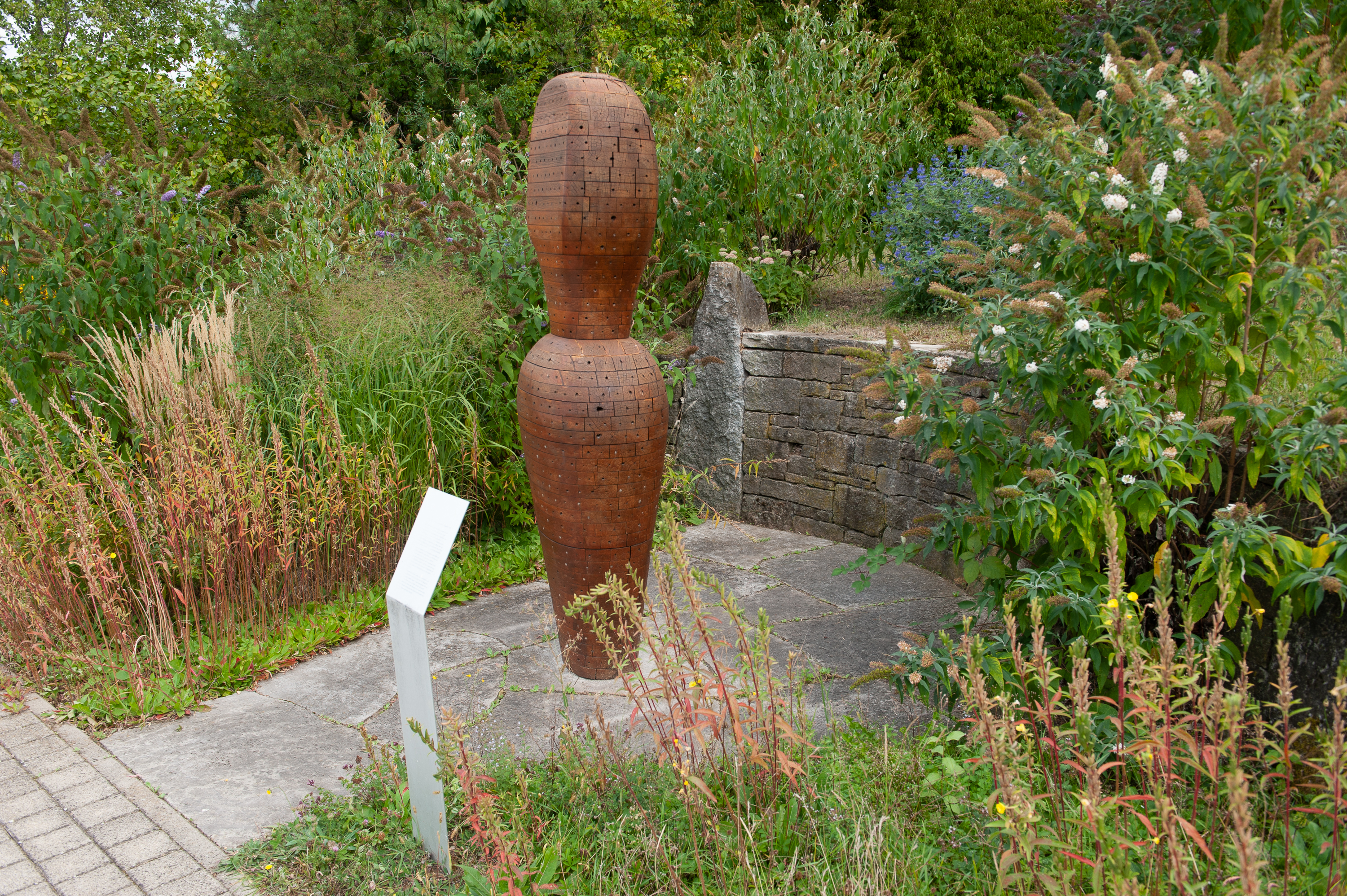 Bienengarten von Jeanette Zippel im Patientengarten des Robert-Bosch-Krankenhauses, Stuttgart